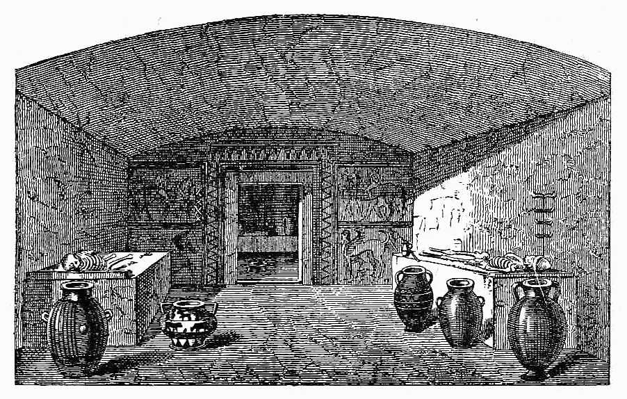 intérieur d’une tombe étrusque, telle qu’elle fut découverte, en 1842, près de Veii